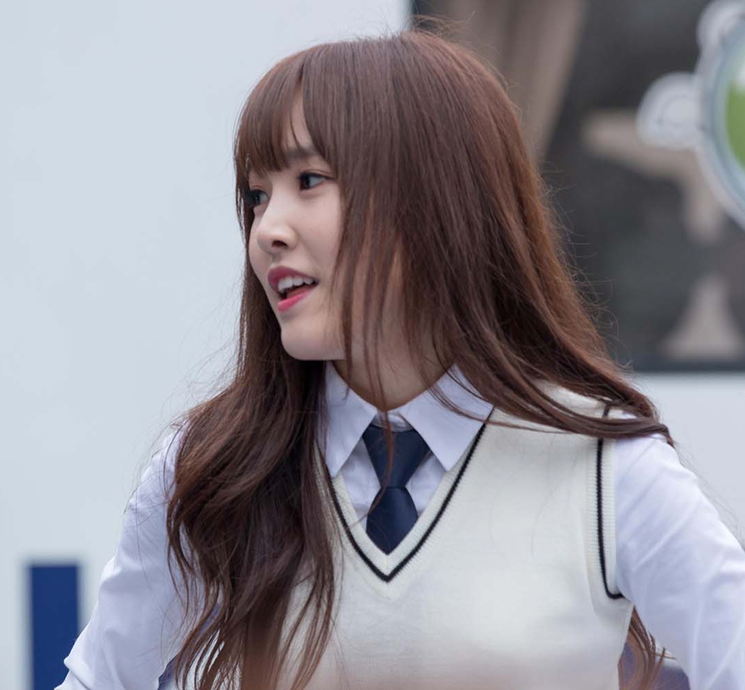 16.04.09 박지윤의 가요광장_유주 직찍